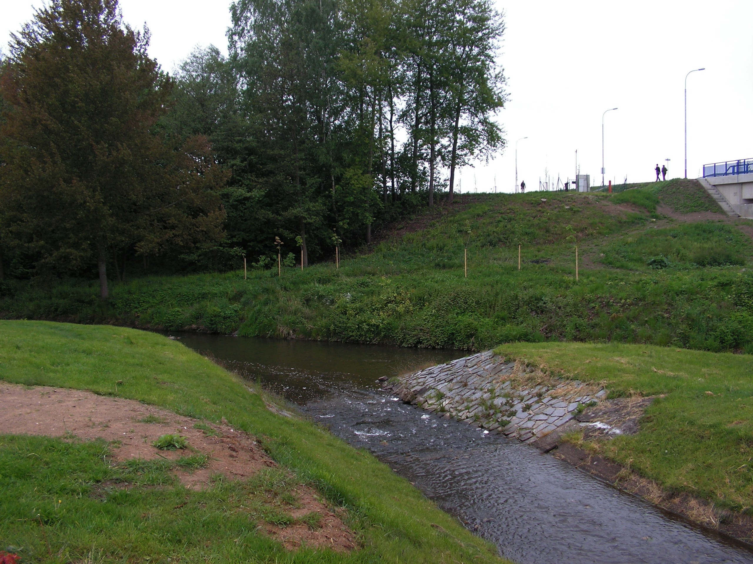 Ústí Stavišťského potoka do Sázavy ve Žďáru nad Sázavou